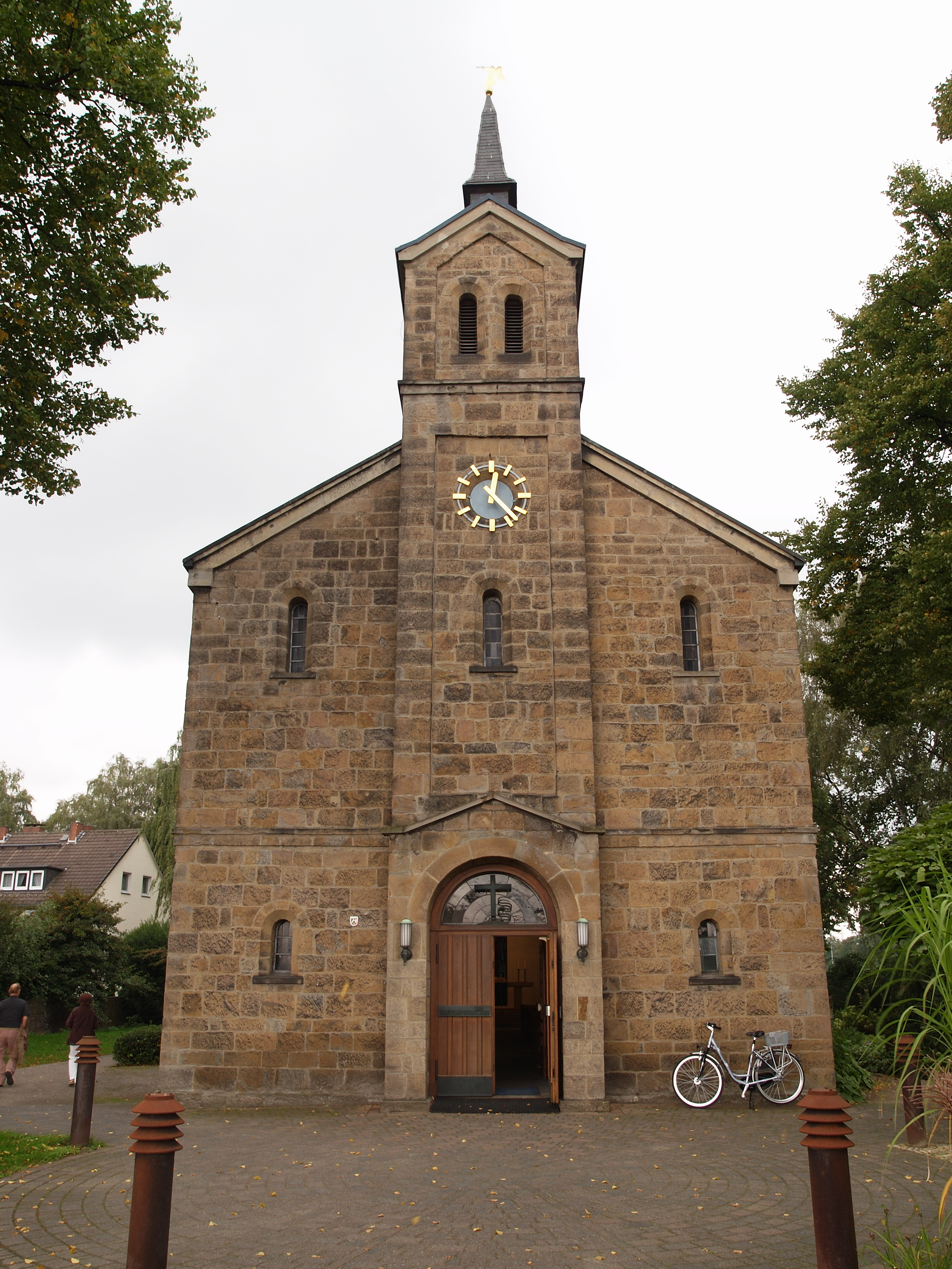 Die Cranger Kirche in Herne-Crange, Ansicht von Osten